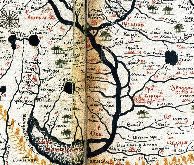 Чертёж всех Сибирских городов, рек и земель, созданный в Москве, в Сибирском приказе со всех городовых чертежей в 1695 году в сентябре 18-го числа по белой ткани длиной 6 аршин, а поперёк 4 аршина. Лист 21 (карта)